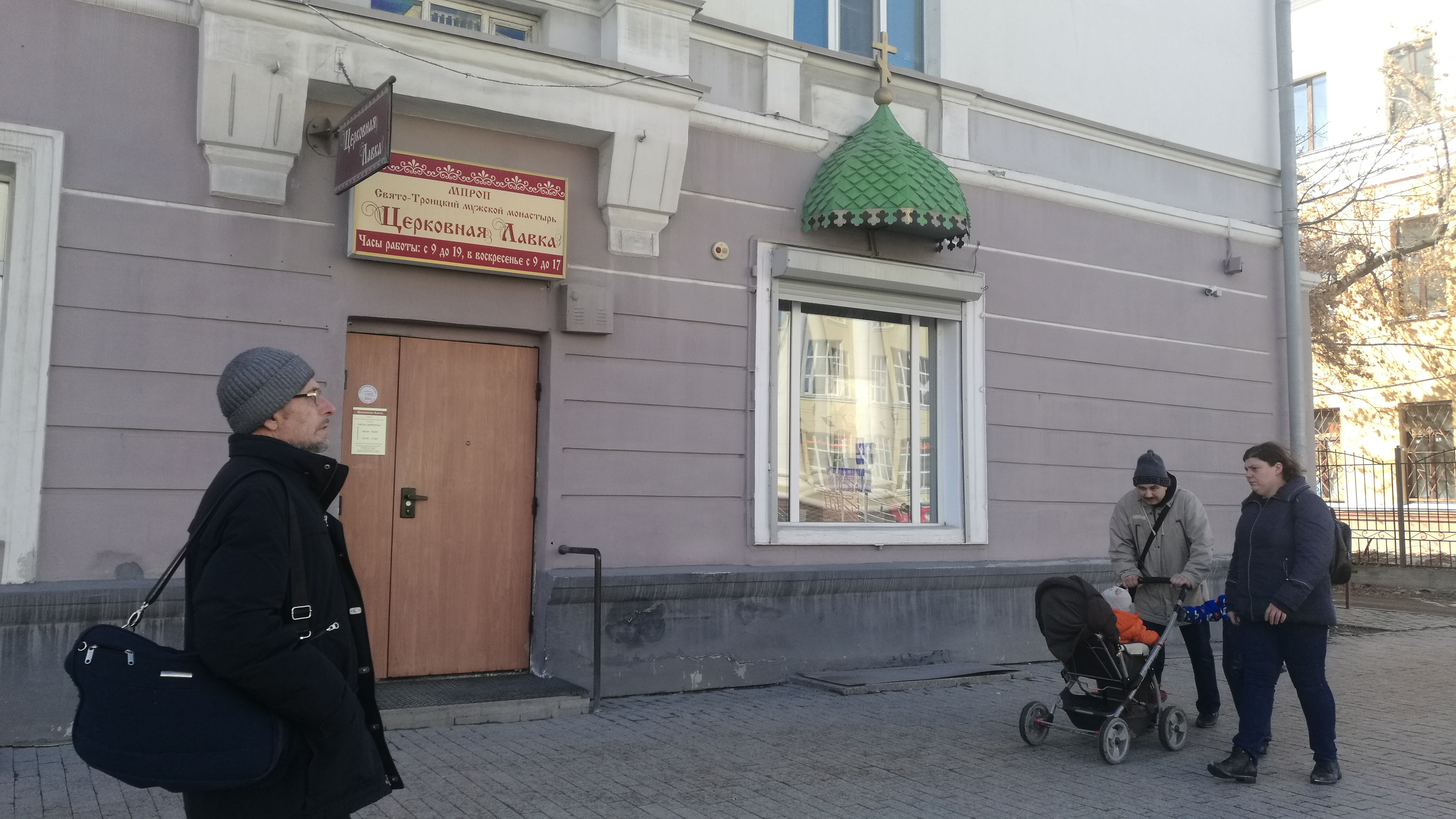 La ortodoksa butiko en strato Respubliko. Tjumeno, Rusio.